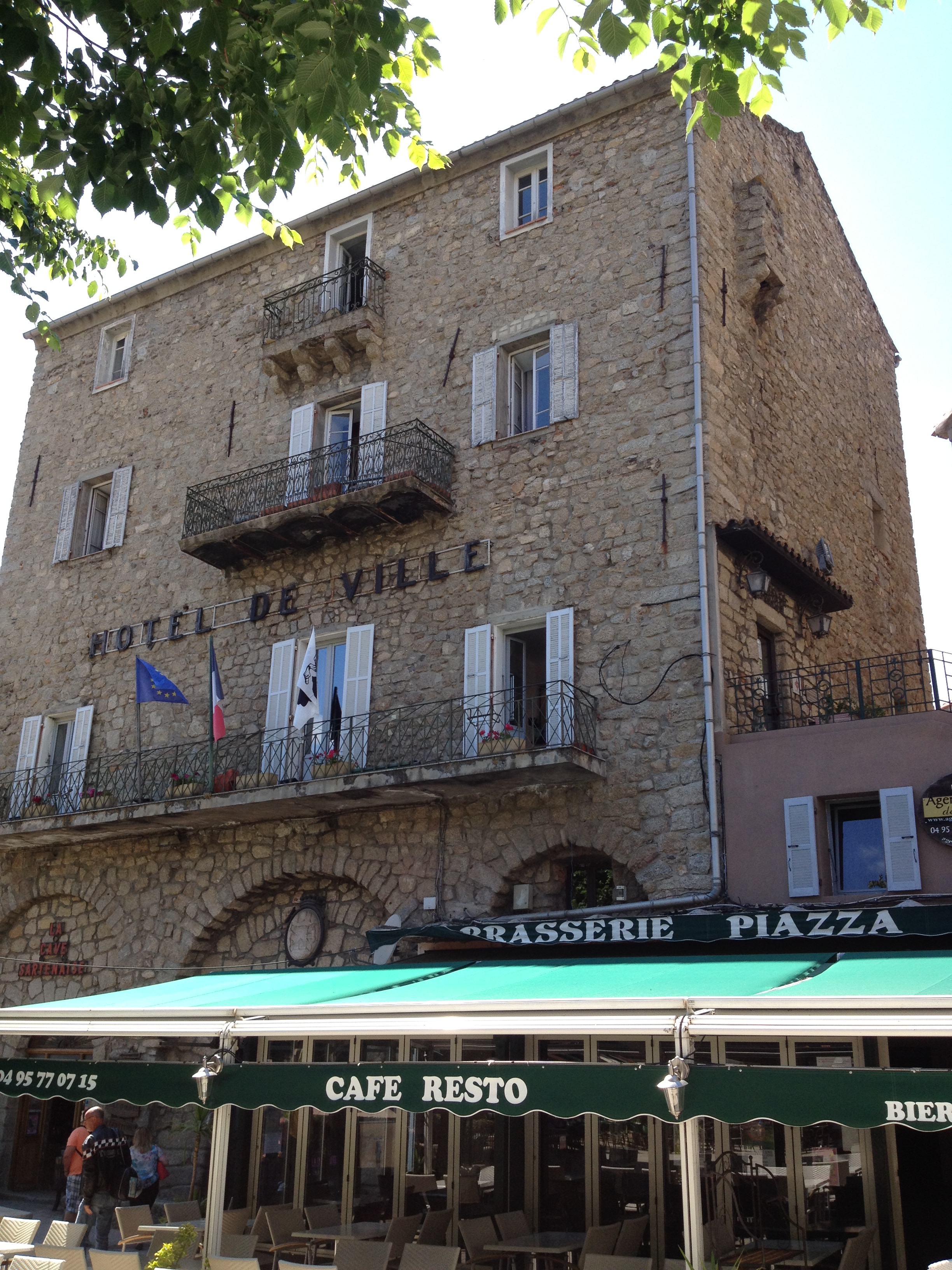 Hôtel de Ville de Sartène en juin 2014